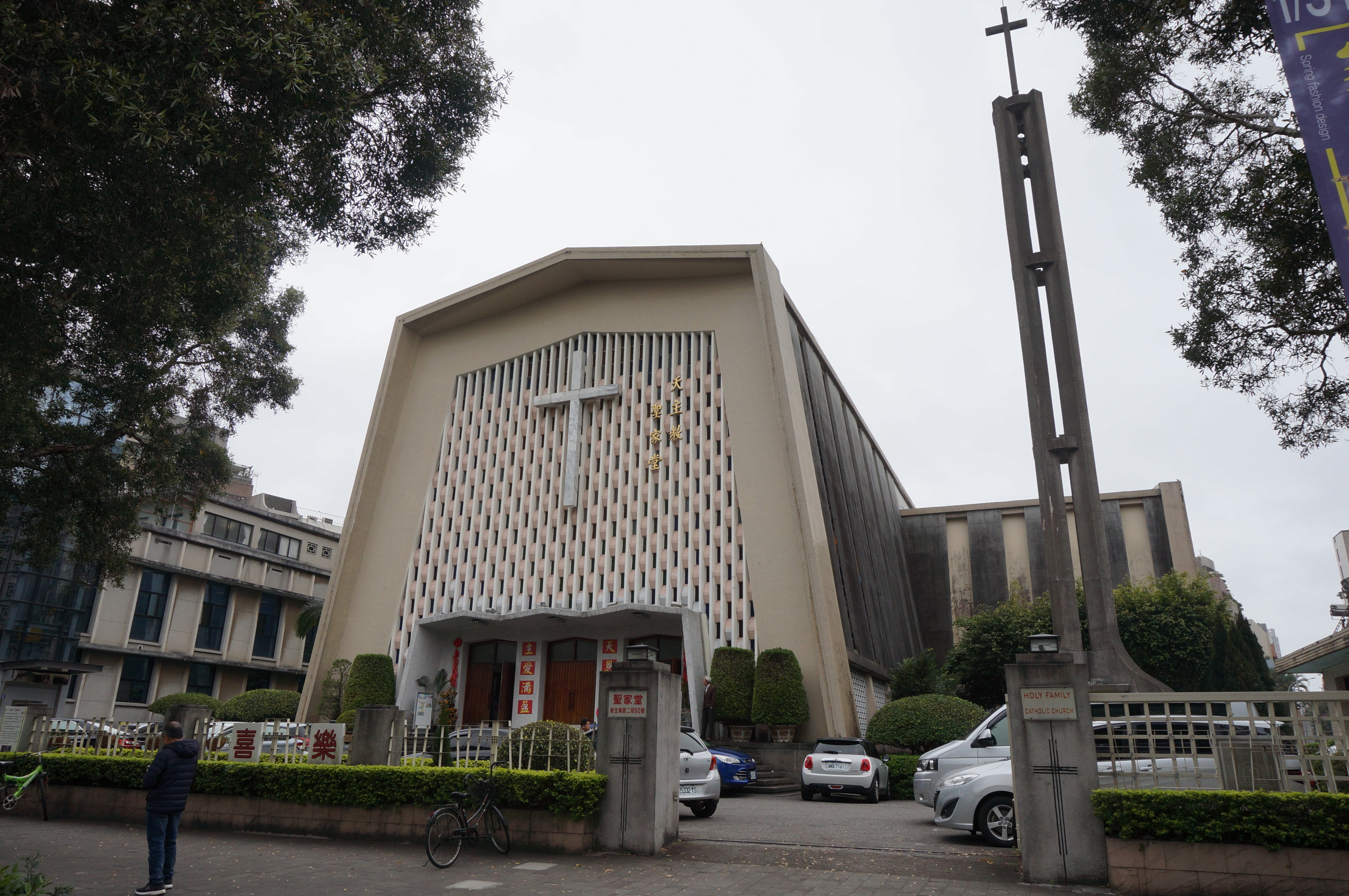 天主教台北總教區台北聖家堂C棟。